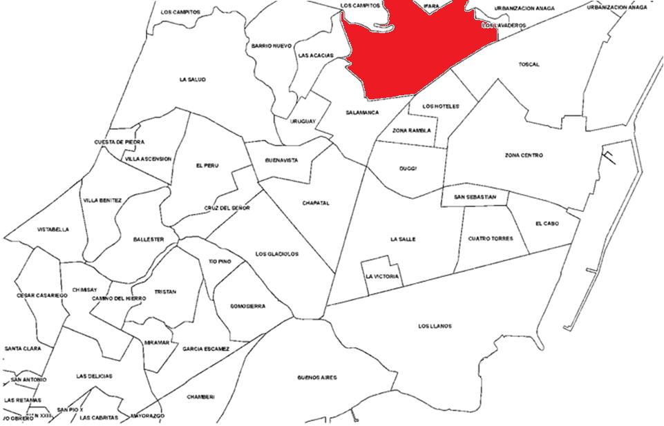 Localización del barrio